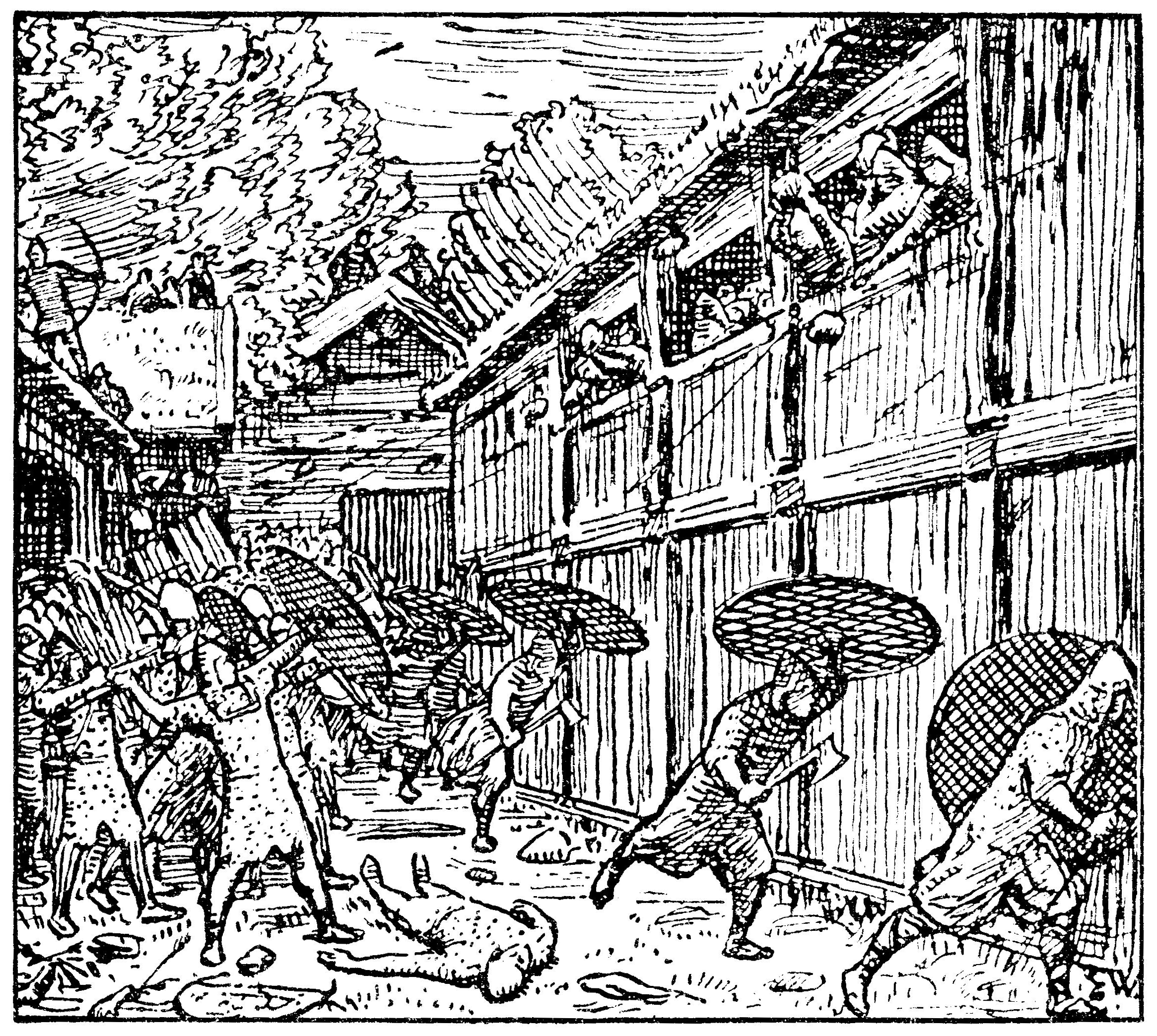 Erik Werenskiold: Illustration for Magnus Erlingssons saga, Heimskringla 1899-edition. nn: «Birkebeinarne fylte garden og kringsette loftet.»